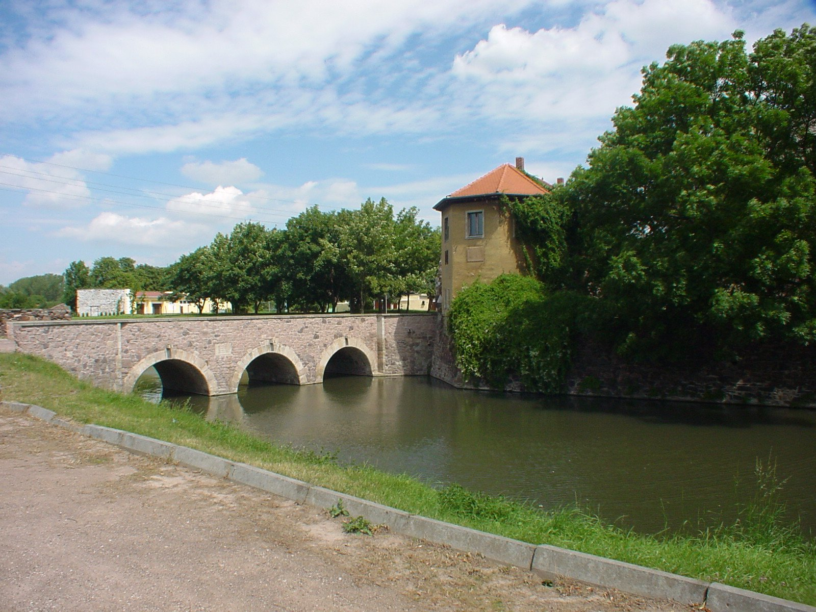 Ostrau public domain, eigenes Foto von 2004 Mewes 20:11, 13. Feb 2005 (CET)